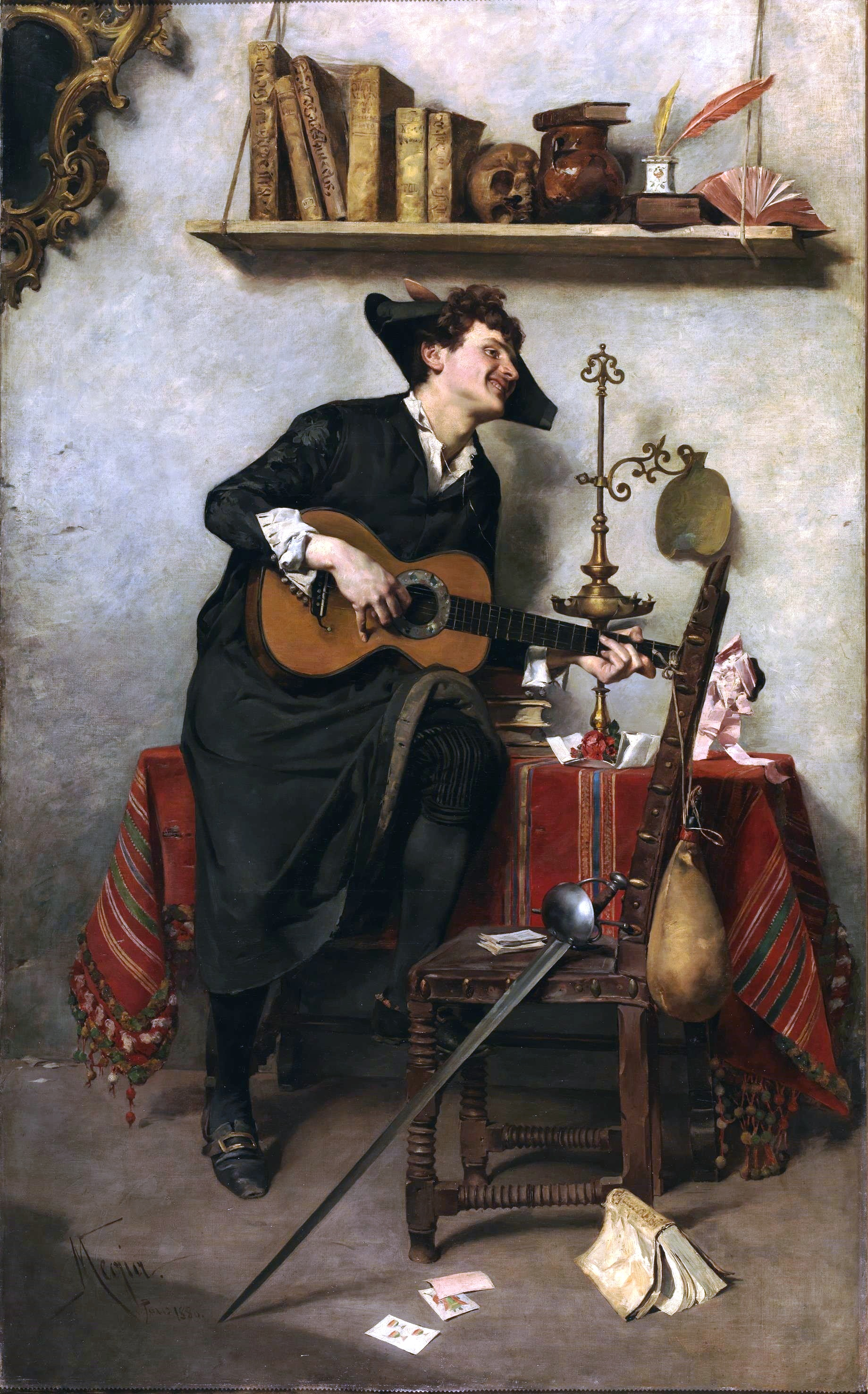 La obra representa a un estudiante de la Universidad de Salamanca, situada en España, tocando una guitarra.